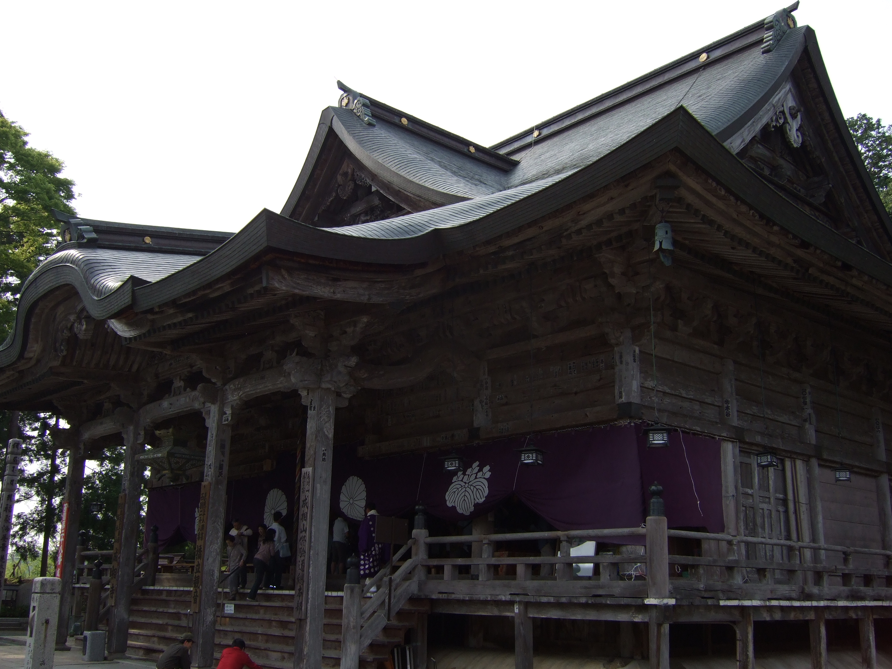 成相寺